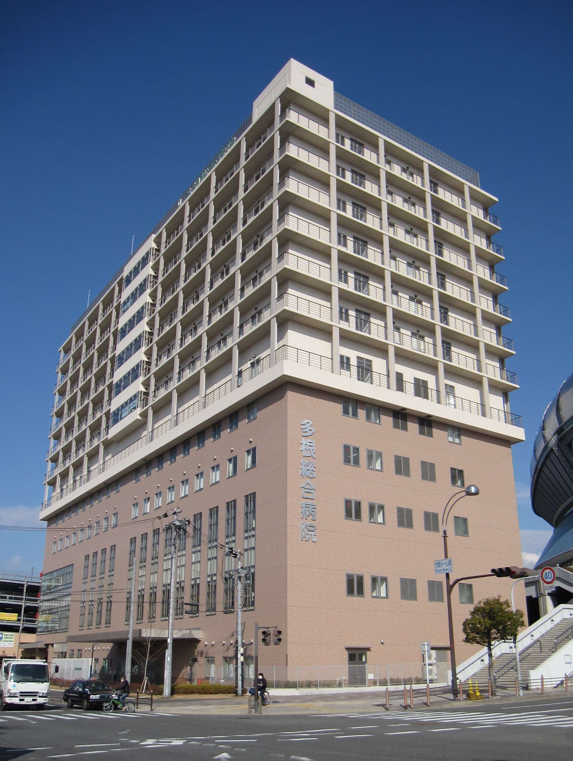 多根総合病院